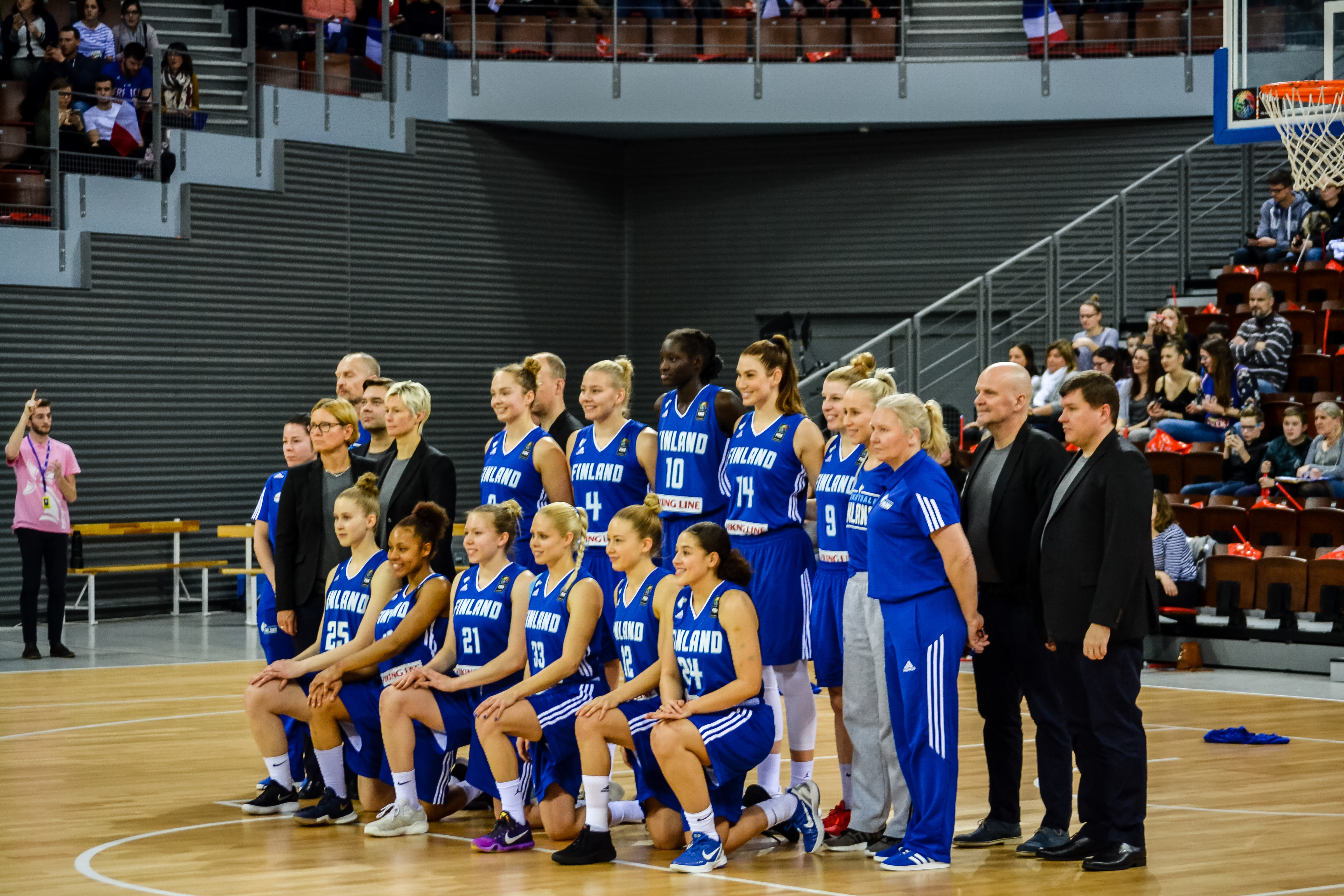 Rencontre de l'Equipe de France féminine de basket-ball contre la Finlande (90-40), comptant pour les qualifications à l'Euro 2019, le 14 février 2018 à Brest. C'était la première fois que la Brest Arena, d'une capacité de 5 000 spectateurs, accueillait un match international de basket.